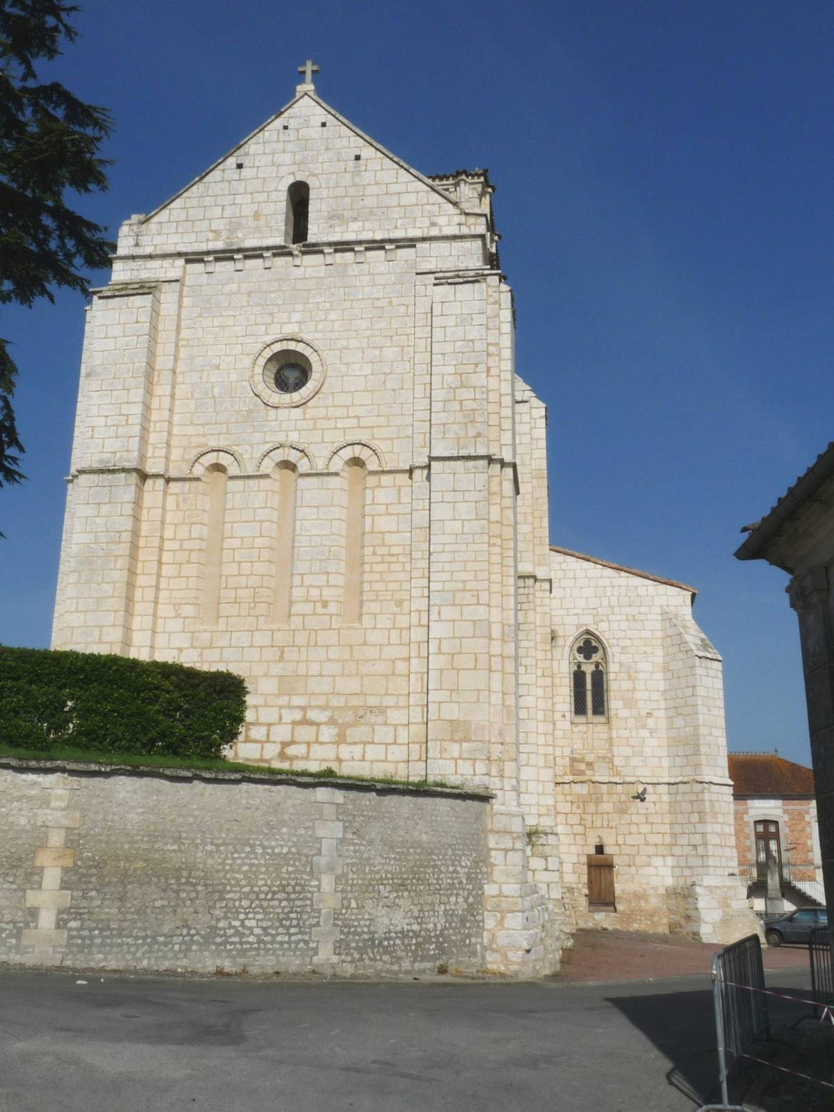 Eglise de Genté, Charente, France